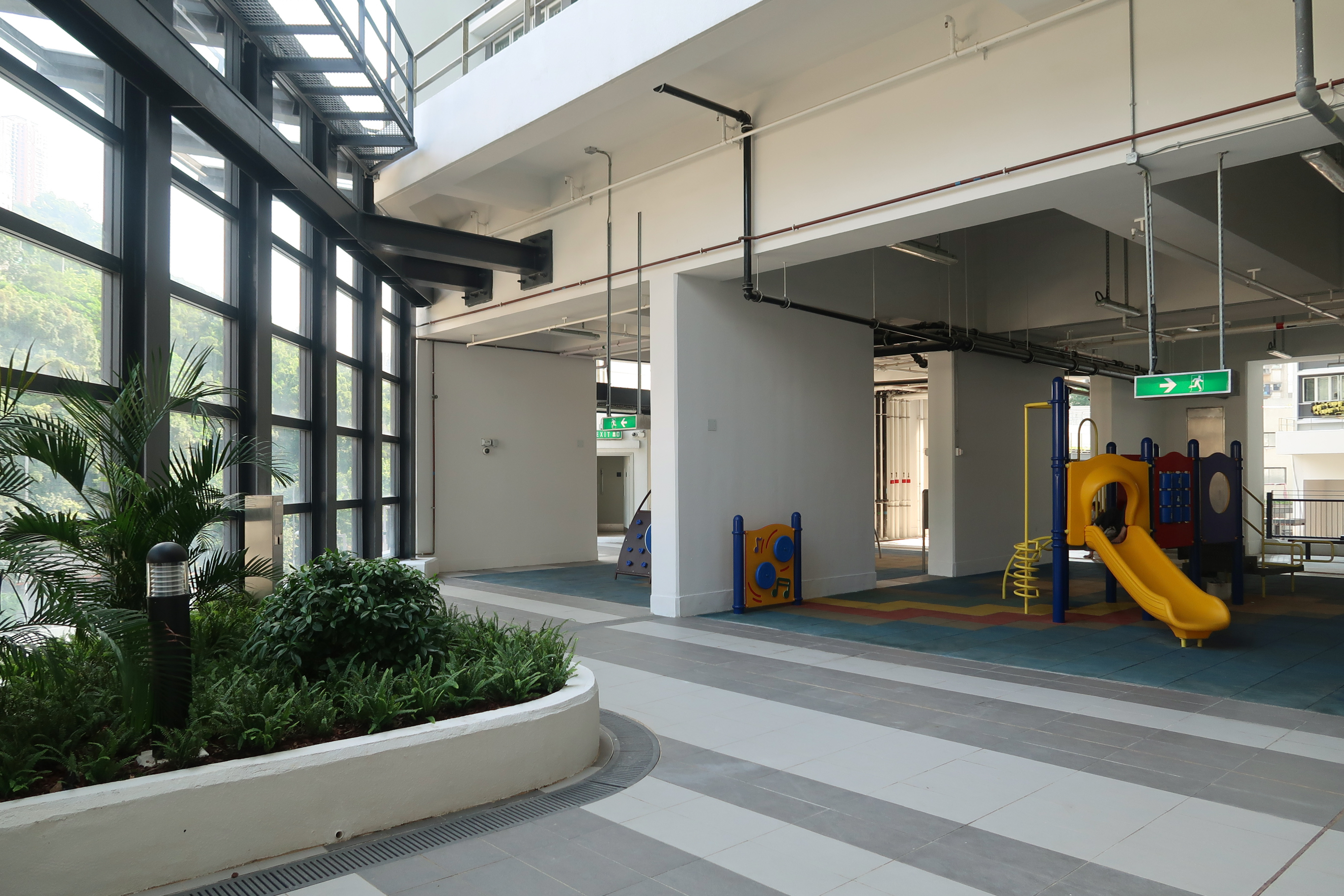 Kwai Tsui Estate P2 Children Play Area